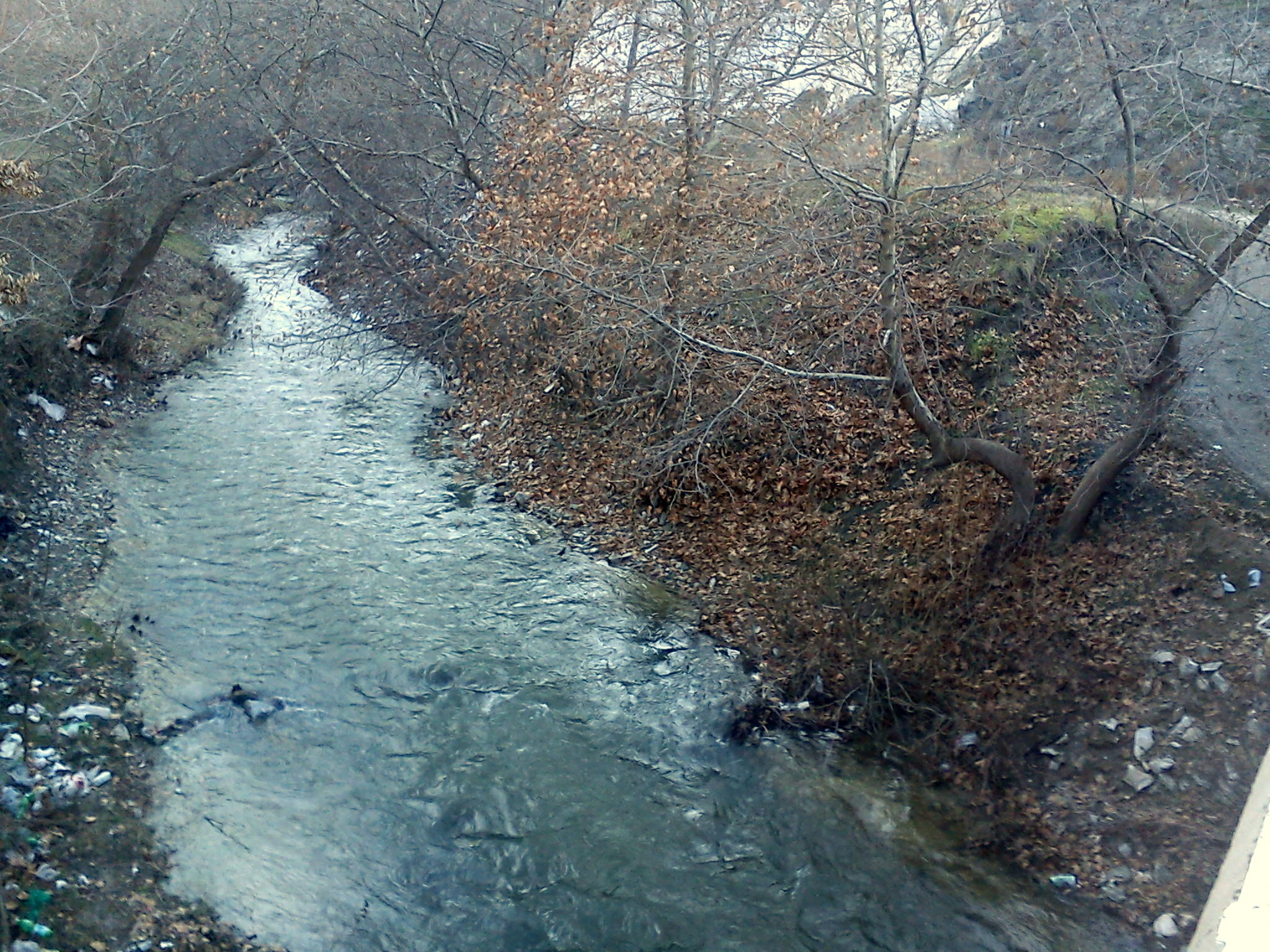 Реката Тополка кај Велес